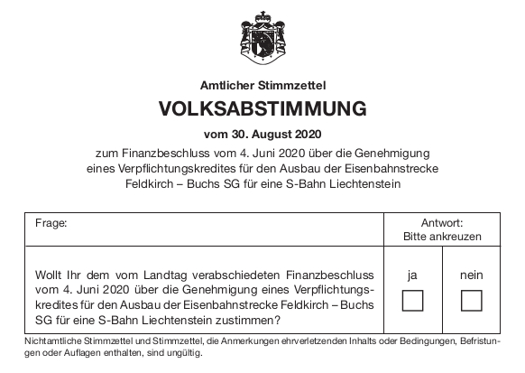 Bulletin de vote référendum Liechteinstein 2020 question 3